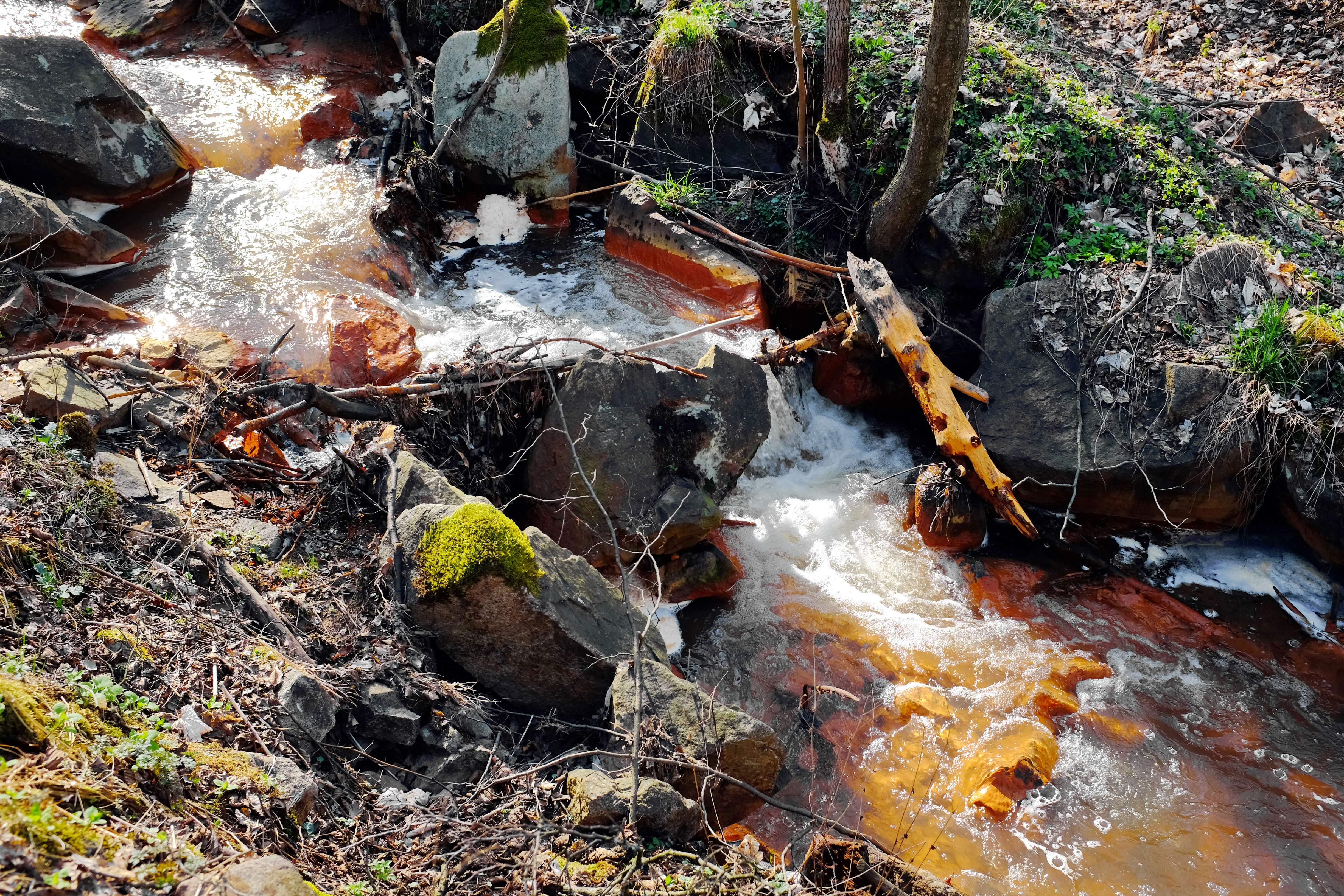 Hruškovský potok ve Starém Sedle pod štolou Jana Křtitele, nad soutokem s Ohří, rezavé zabarvení vody ze štoly, okres Sokolov